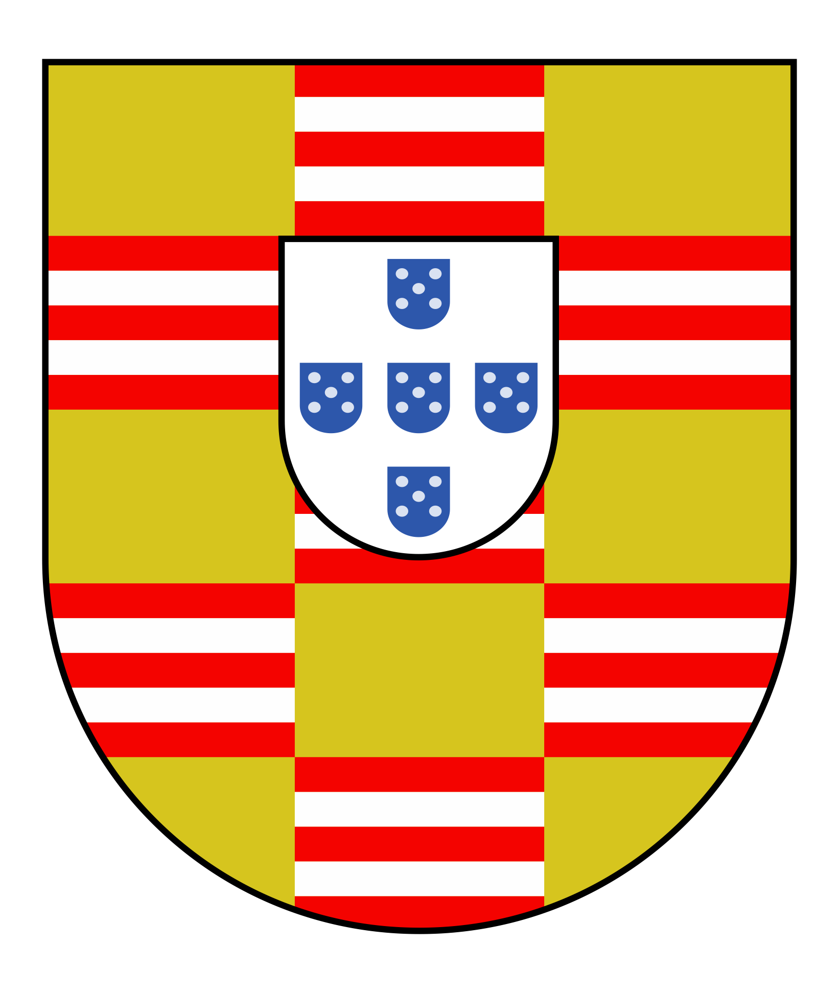 Primeira fase da feitura do brasão do navegador português Vasco da Gama. O desenho deste escudo foi baseado em: 1 - Selos da India (enquanto colônia portuguesa) - Brasões - 1958 2 - Vasco da Gama, Portuguese explorer 3 - OS LUSÍADAS - Astrologia & Mitologia 4 - Selo 5º Centenário do nascimento de Vasco da Gama 5 - 5o. Centenário do Nascimento de Vasco da Gama (versão 2) 6 - Selos Portugueses Usados em 1969 : Vasco da Gama 7 - Heraldic stamps from Guinea Bissau